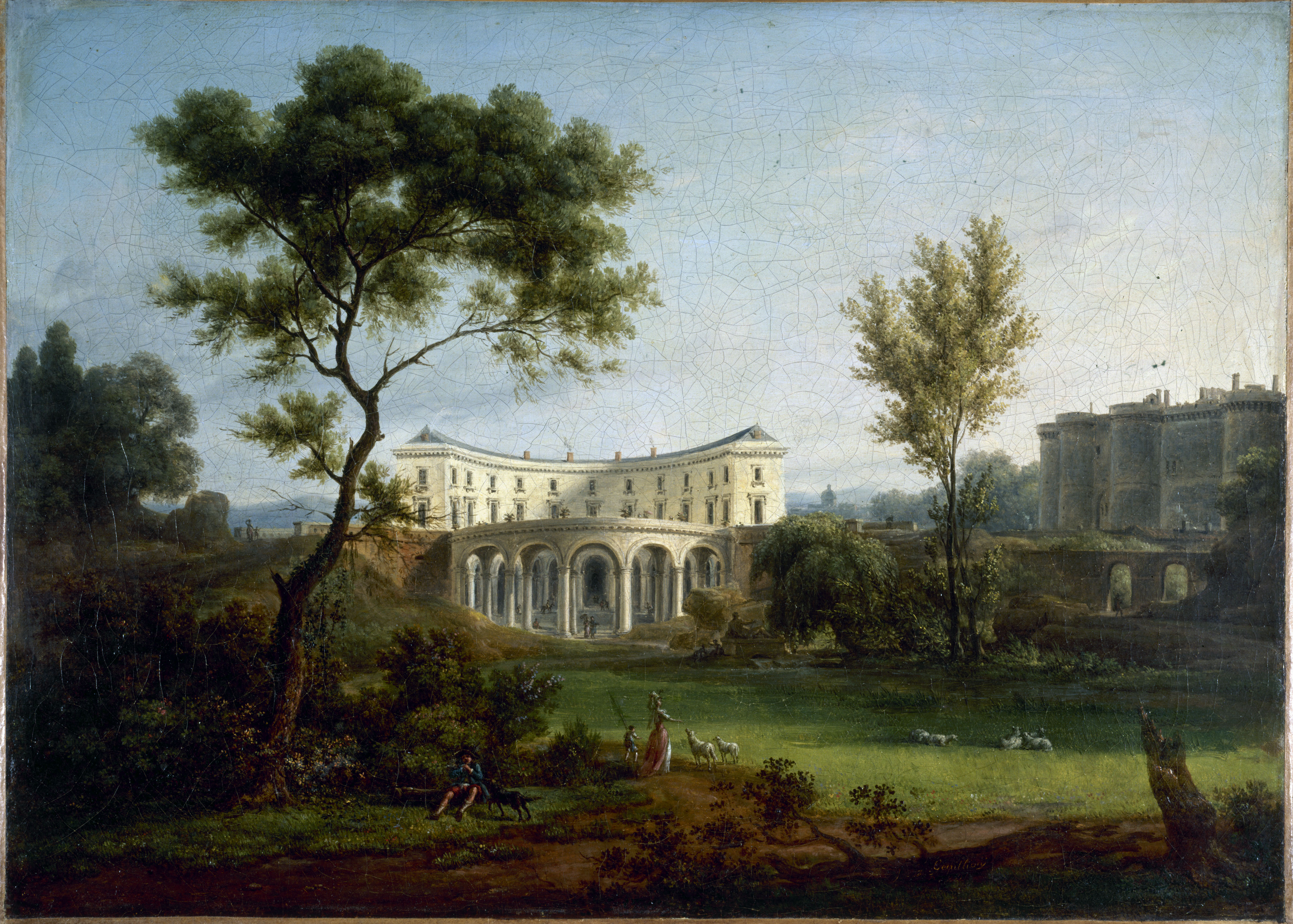 Jean-Baptiste-François Génillion (1750–1829): Das Haus von Pierre-Augustin Caron de Beaumarchais (1732–1799) und die Bastille. 39,5 x 55 cm. Musée Carnavalet, Histoire de Paris.